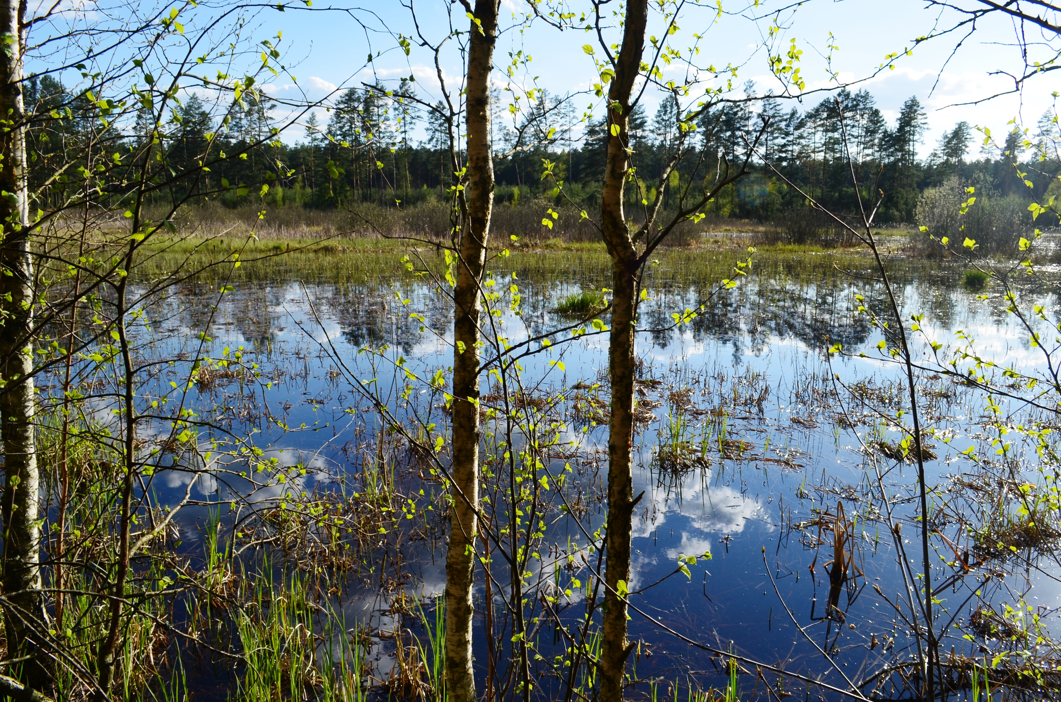 Pelkynės šalia Šeškučių, Vilniaus r.